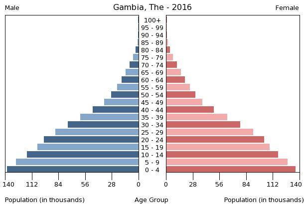 A population pyramid illustrates the age and sex structure of a country's population and may provide insights about political and social stability, as well as economic development. The population is distributed along the horizontal axis, with males shown on the left and females on the right. The male and female populations are broken down into 5-year age groups represented as horizontal bars along the vertical axis, with the youngest age groups at the bottom and the oldest at the top. The shape of the population pyramid gradually evolves over time based on fertility, mortality, and international migration trends.